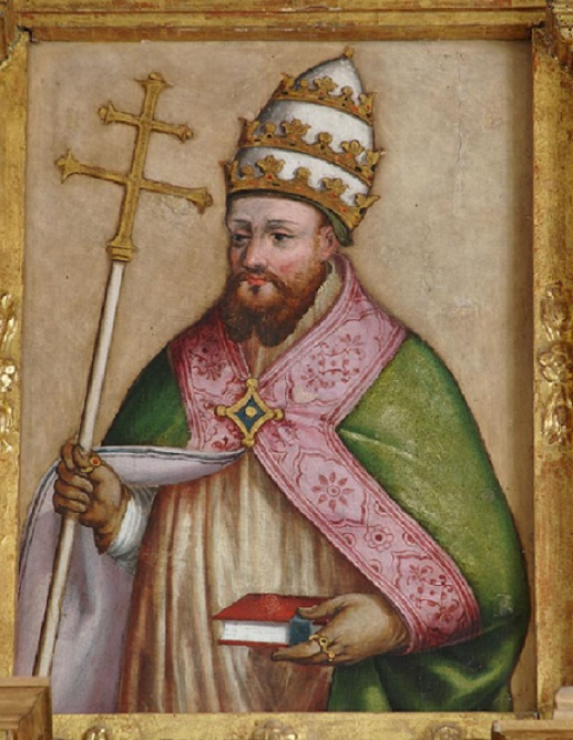 San Gregorio Magno, olio su tavola, 50 x 40 cm, particolare dell'altare della chiesa di S. Michele a Formeaso di Zuglio.